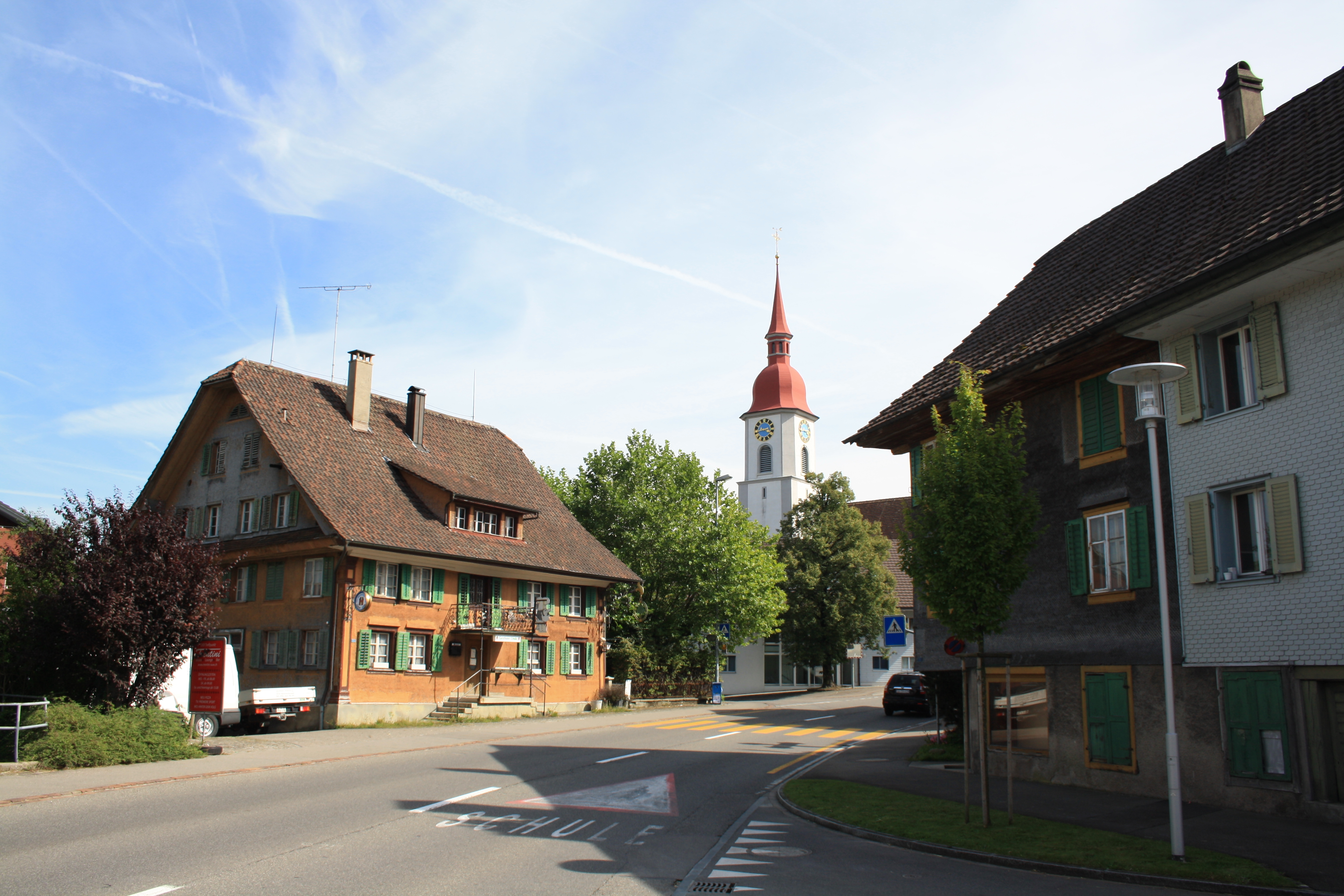 Auw, Kanton Aargau